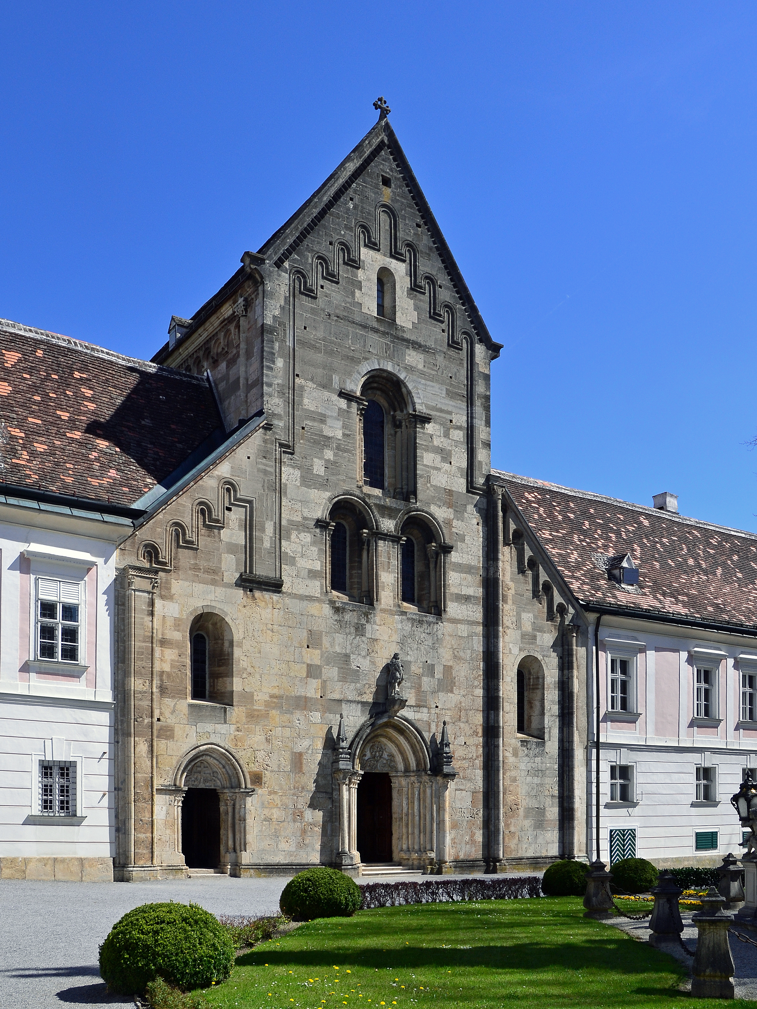 Stiftskirche Heiligenkreuz im Wienerwald